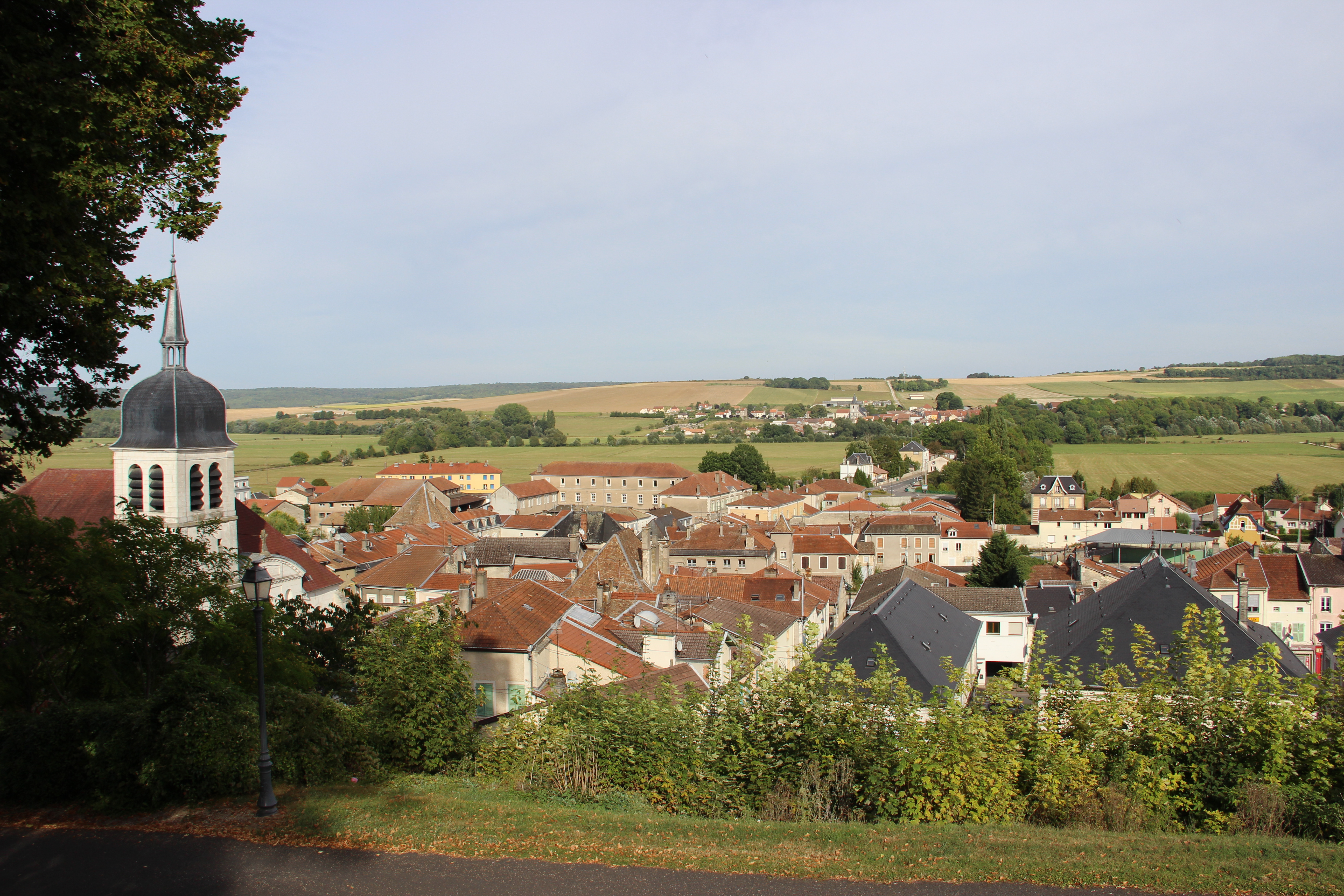 Vue sur la ville depuis les lieux historiques.